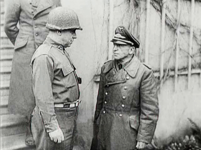 Leland S. Hobbs und Karl Veith (rechts) nach den gescheiterten Kapitulationsverhandlungen am 10. April 1945